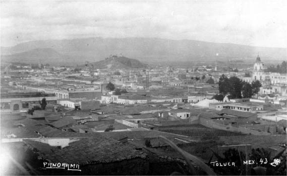 Fotografía antigua de la Ciudad de Toluca